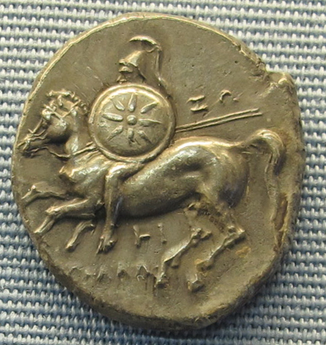 Taranto, didracma, 281-272 ac. ca